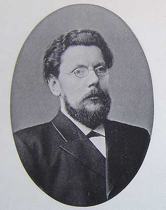 Николай Афанасьевич Митропольский (1847—1918) — российский врач-терапевт, профессор Московского университета, декан медицинского факультета Московского университета.